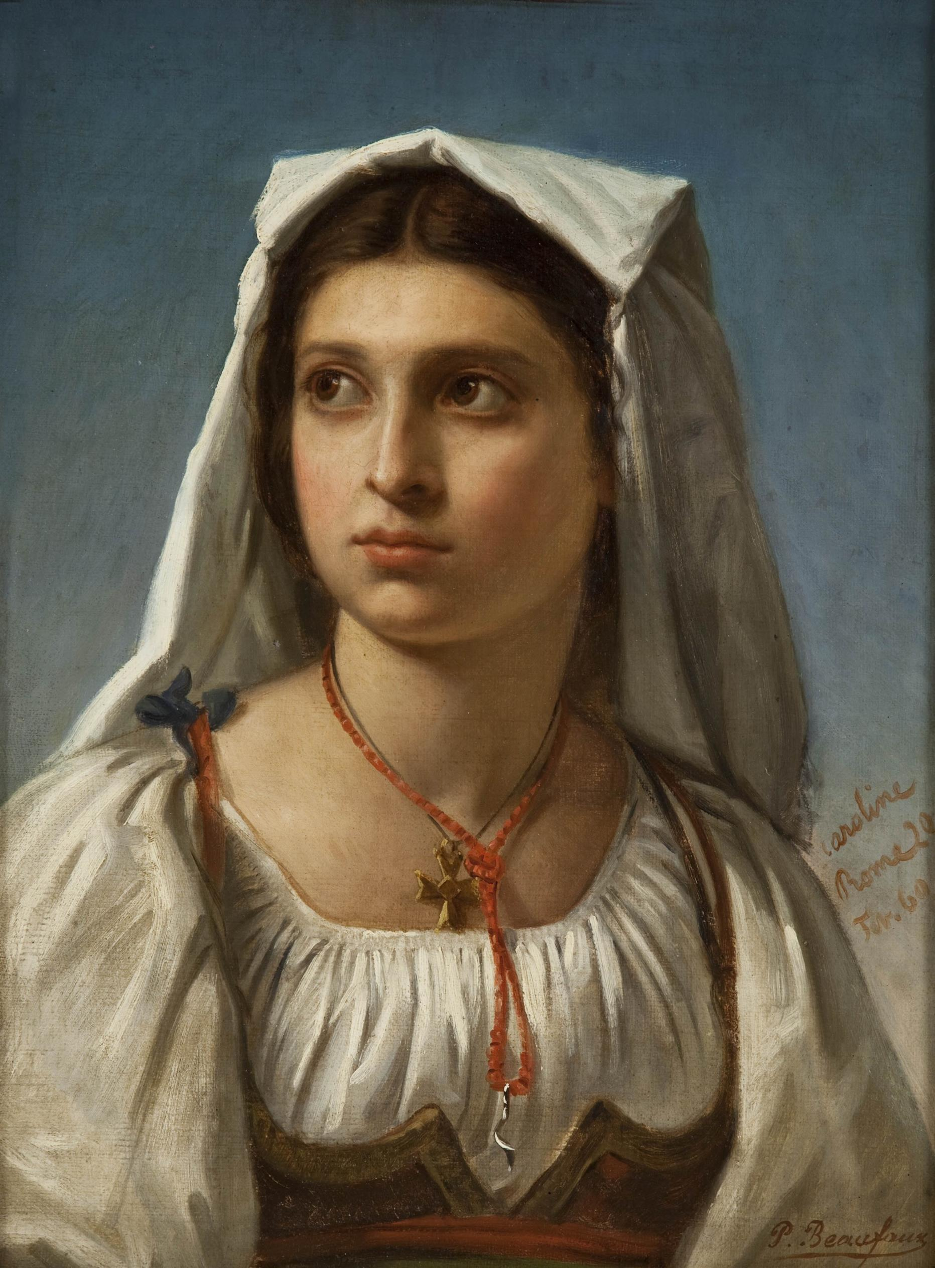 Ritratto di popolana